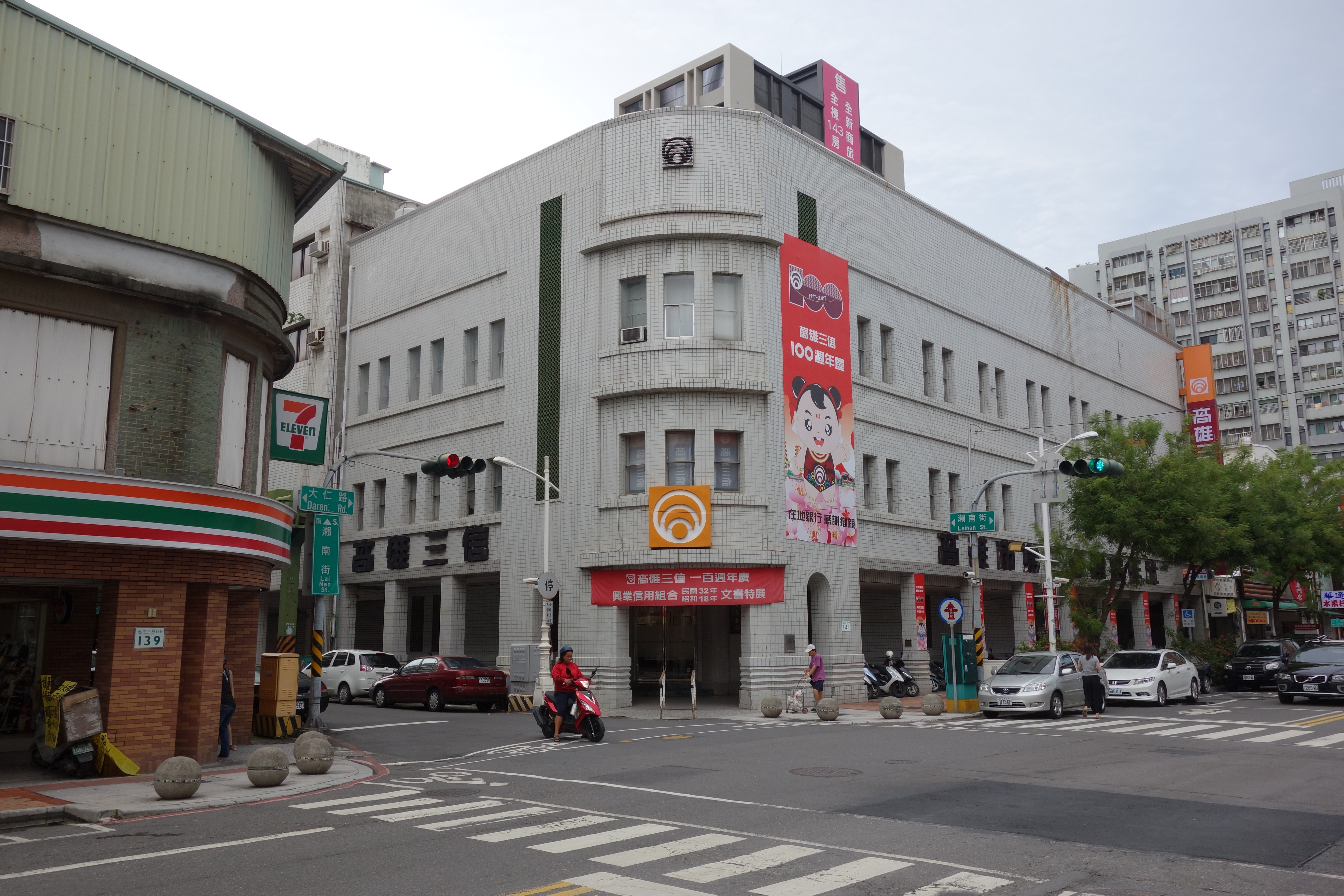 中文（台灣）: 蔡欲修建築師設計的興業信用組合事務所，現為高雄市第三信用合作社